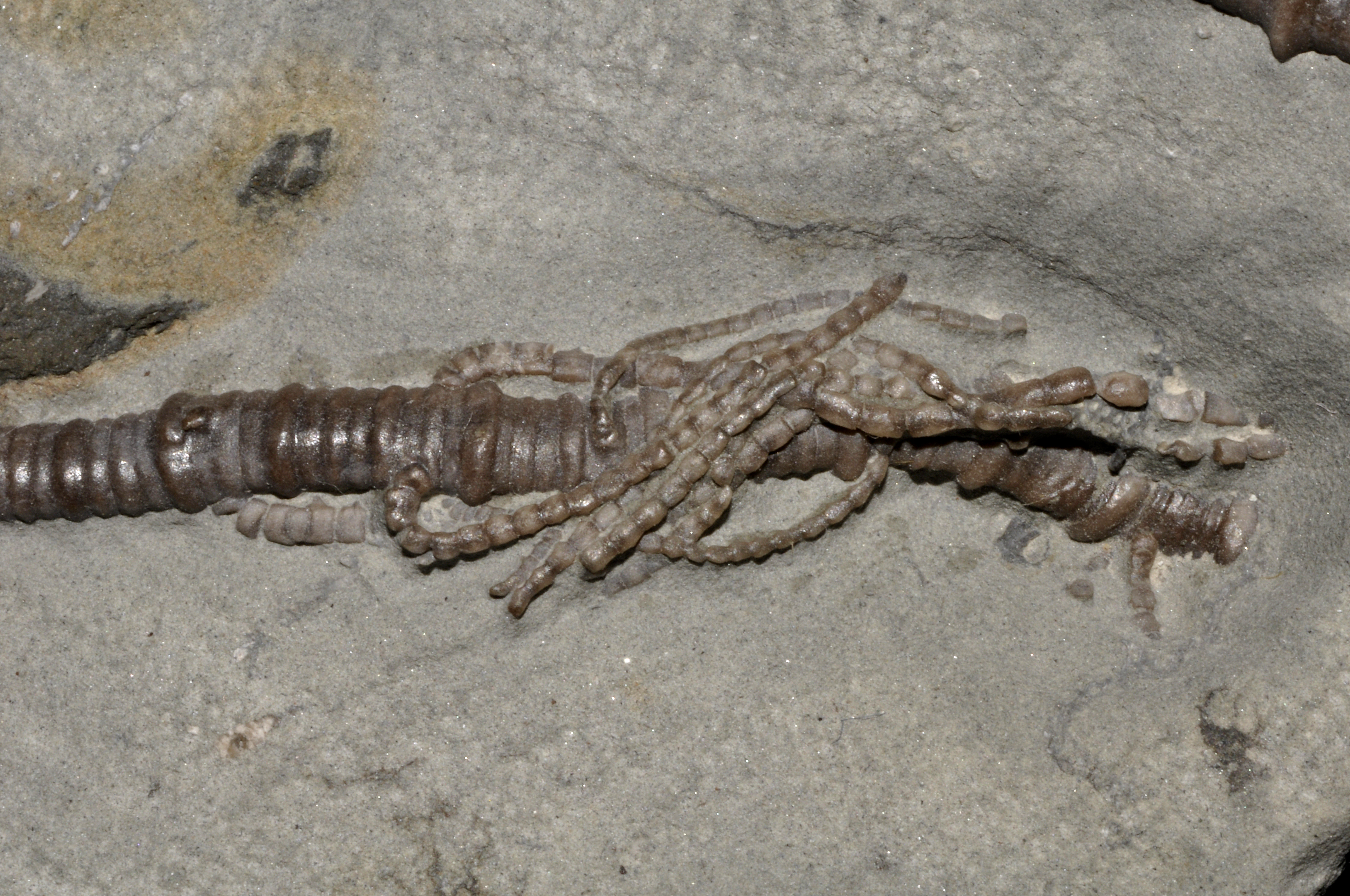 Agaricocrinus americanus "podias accessoires" appelés "pinnules".